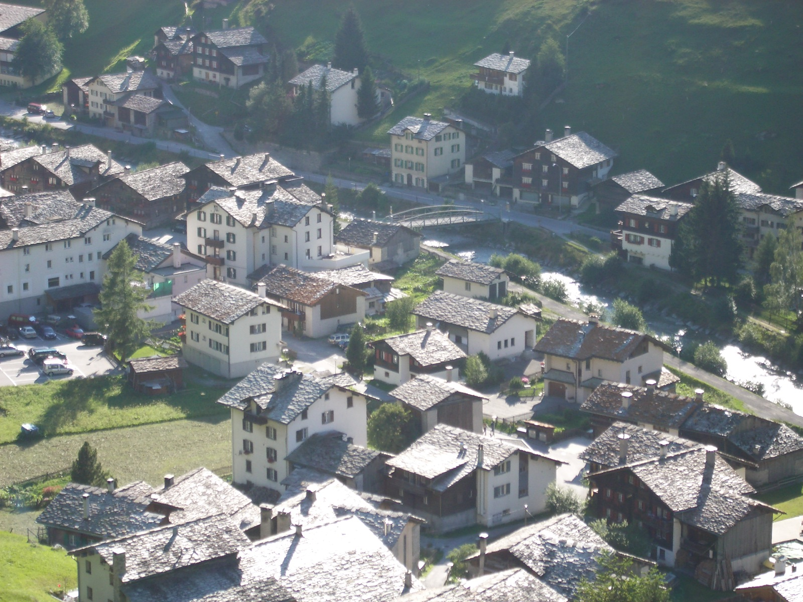 Vals GR, Switzerland self-made, August 2005